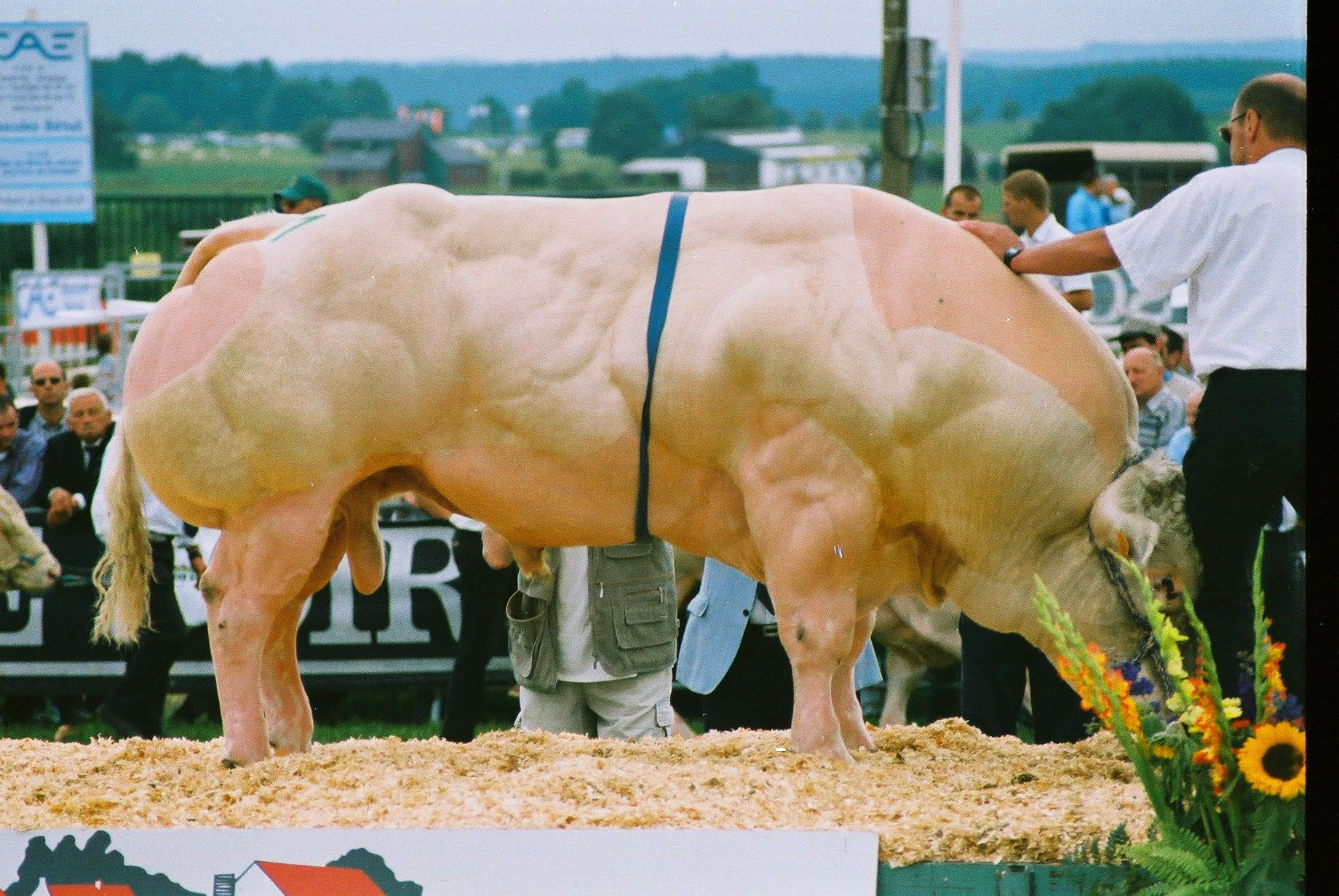 Bulle in Libramont